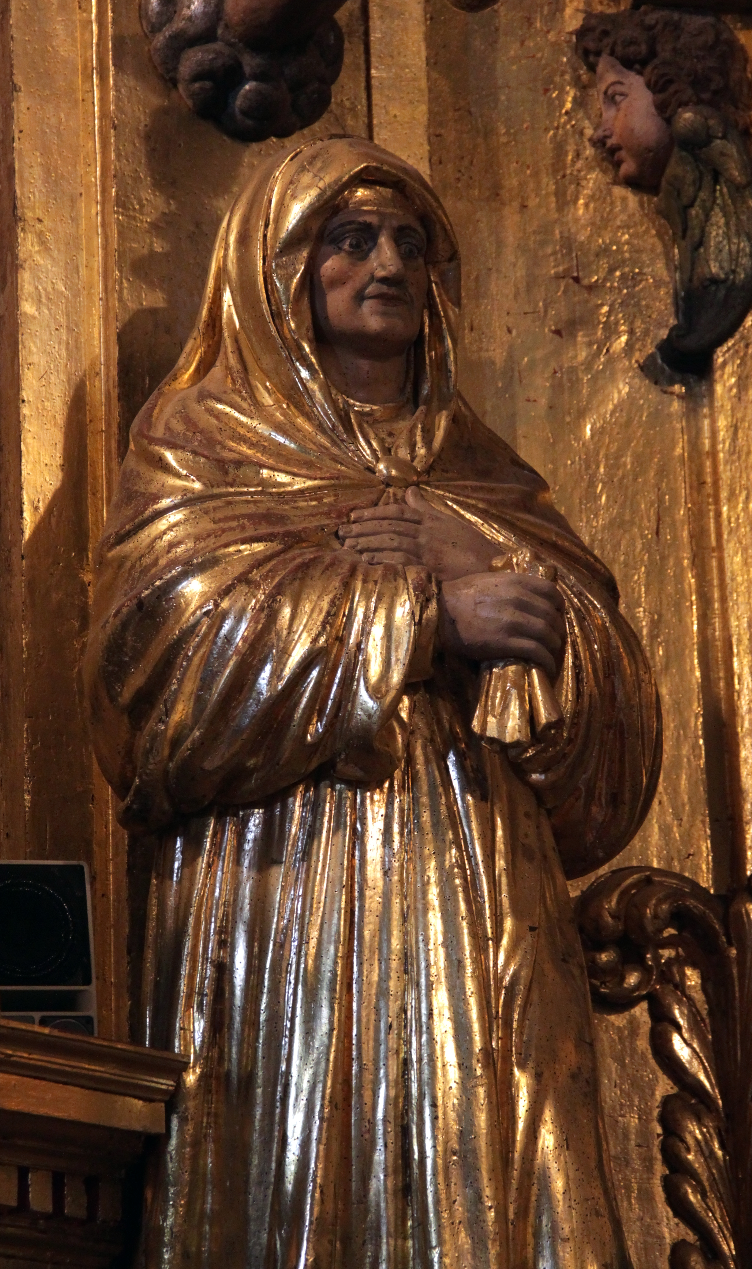 Statue réprésentant Sara / Sarah, faisant partie du retable du maître-autel de Notre-Dame de Garaison, réalisé à partir d'Octobre 1635 par Pierre Affre, artiste toulousain.